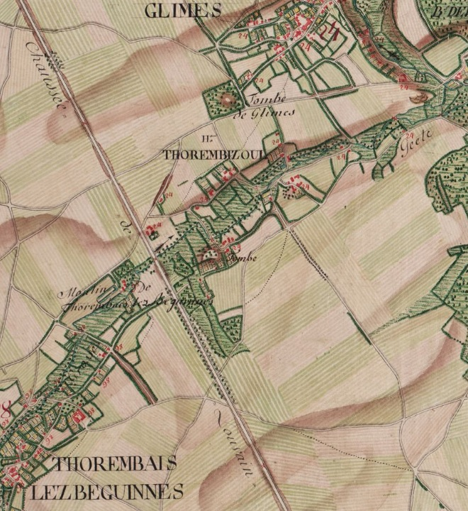 Extrait de la carte de Ferraris n° 114B